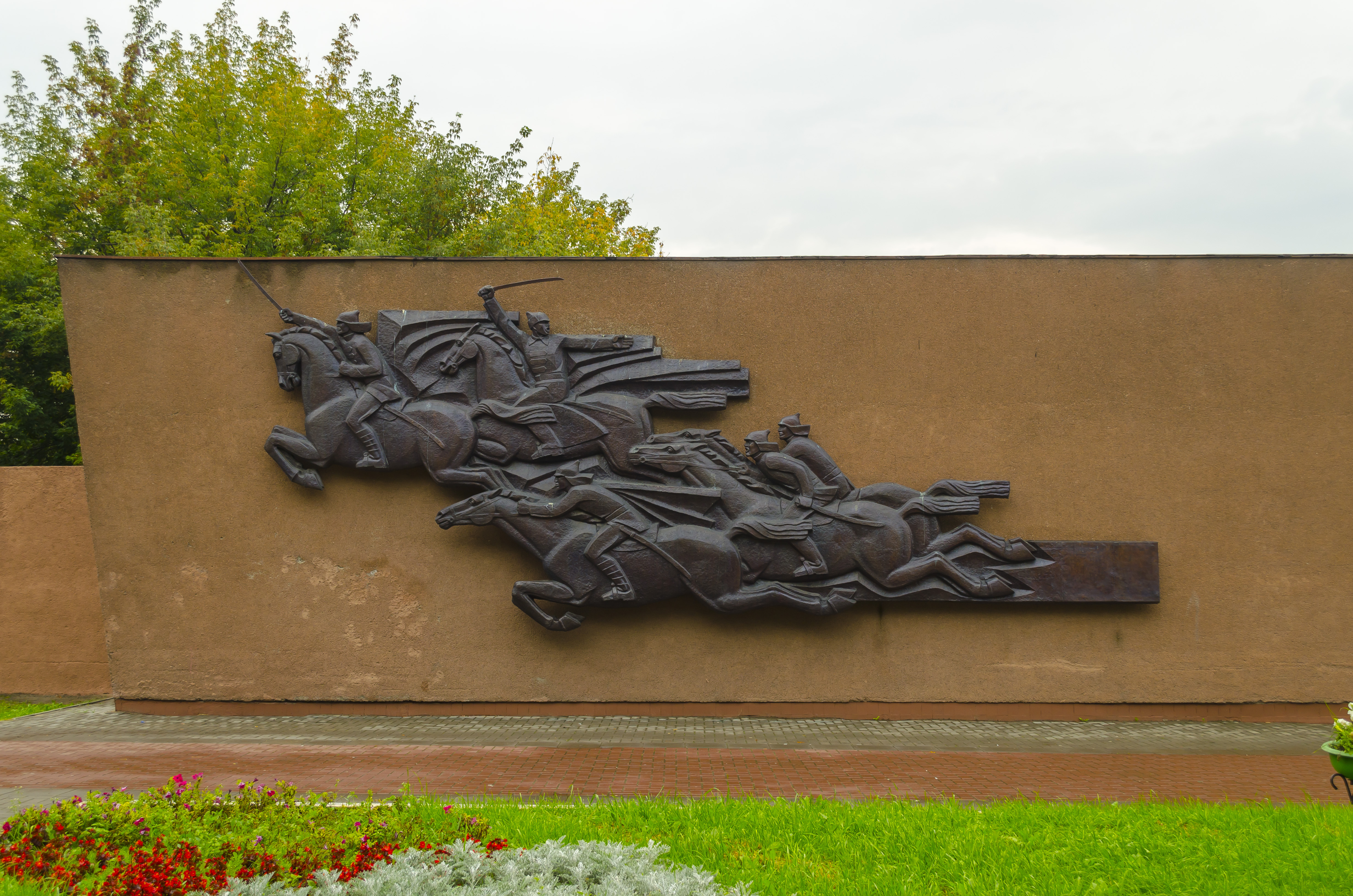 Барельеф на музее Чапаева в г.Чебоксары